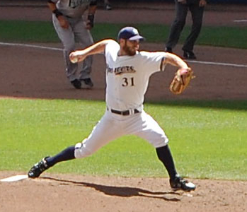 Dave Bush